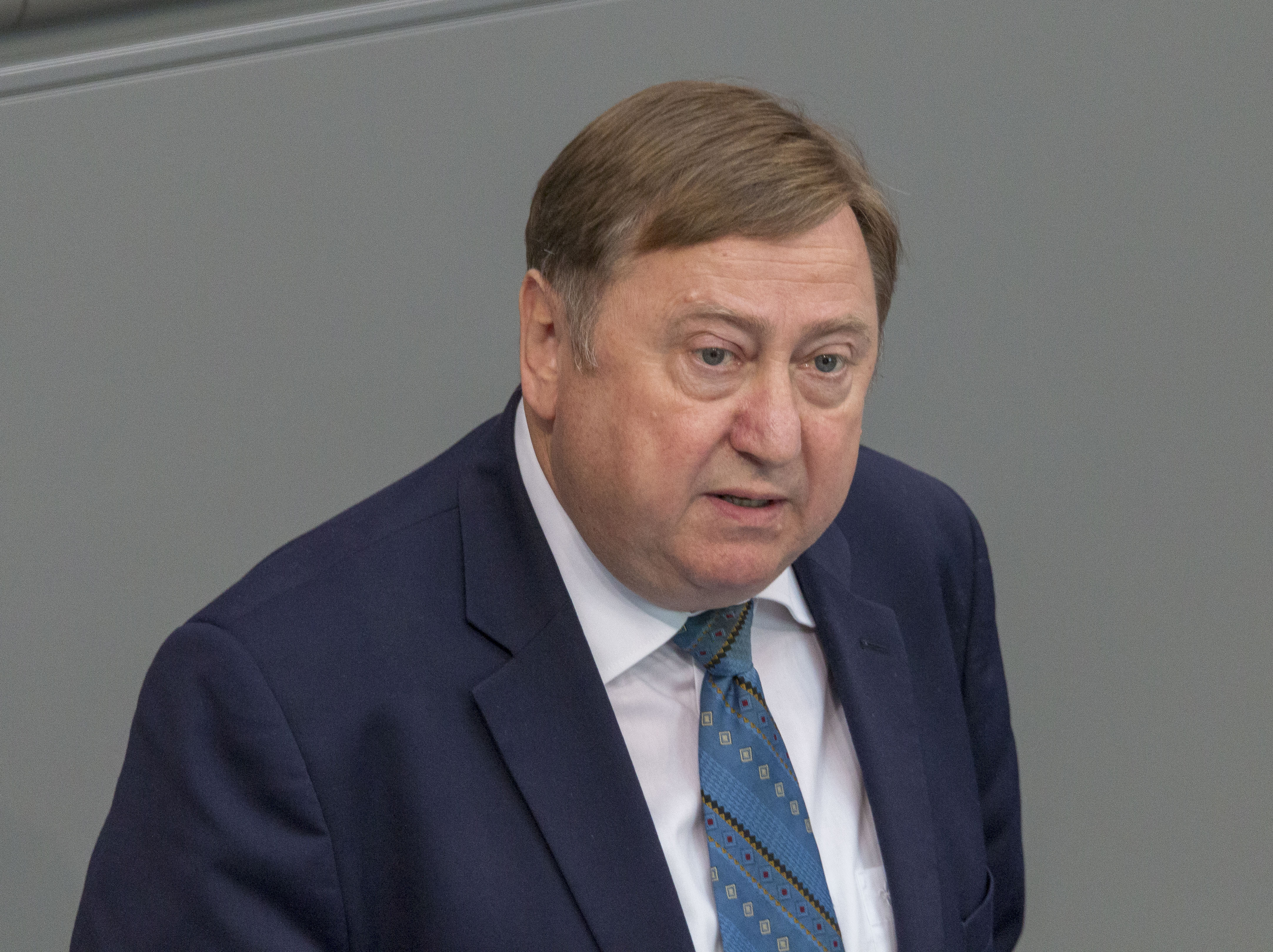 André Hahn während einer Plenarsitzung des Deutschen Bundestages am 2. Juli 2020 in Berlin.